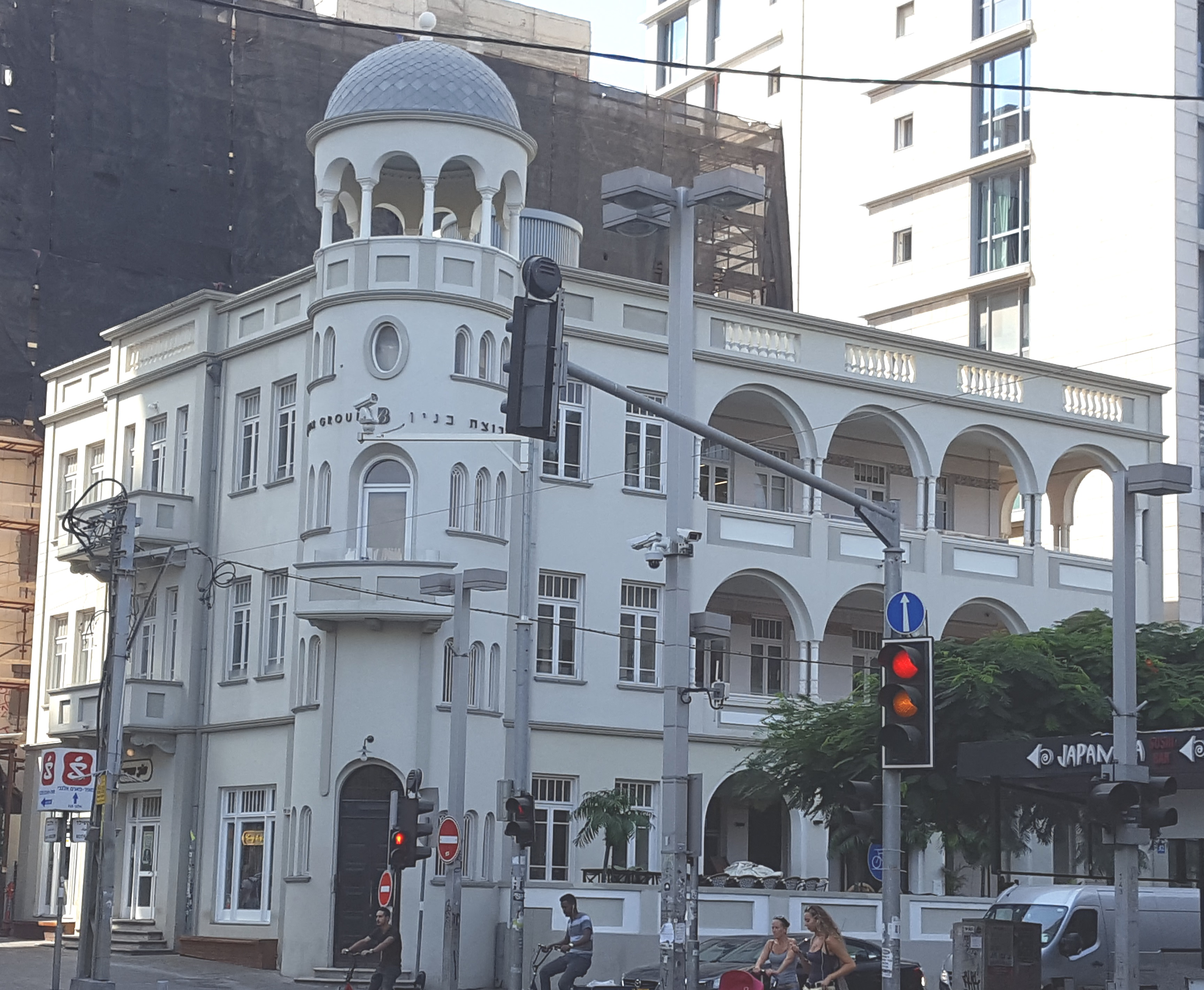 מלון גינוסר לאחר שיקום שיחזור